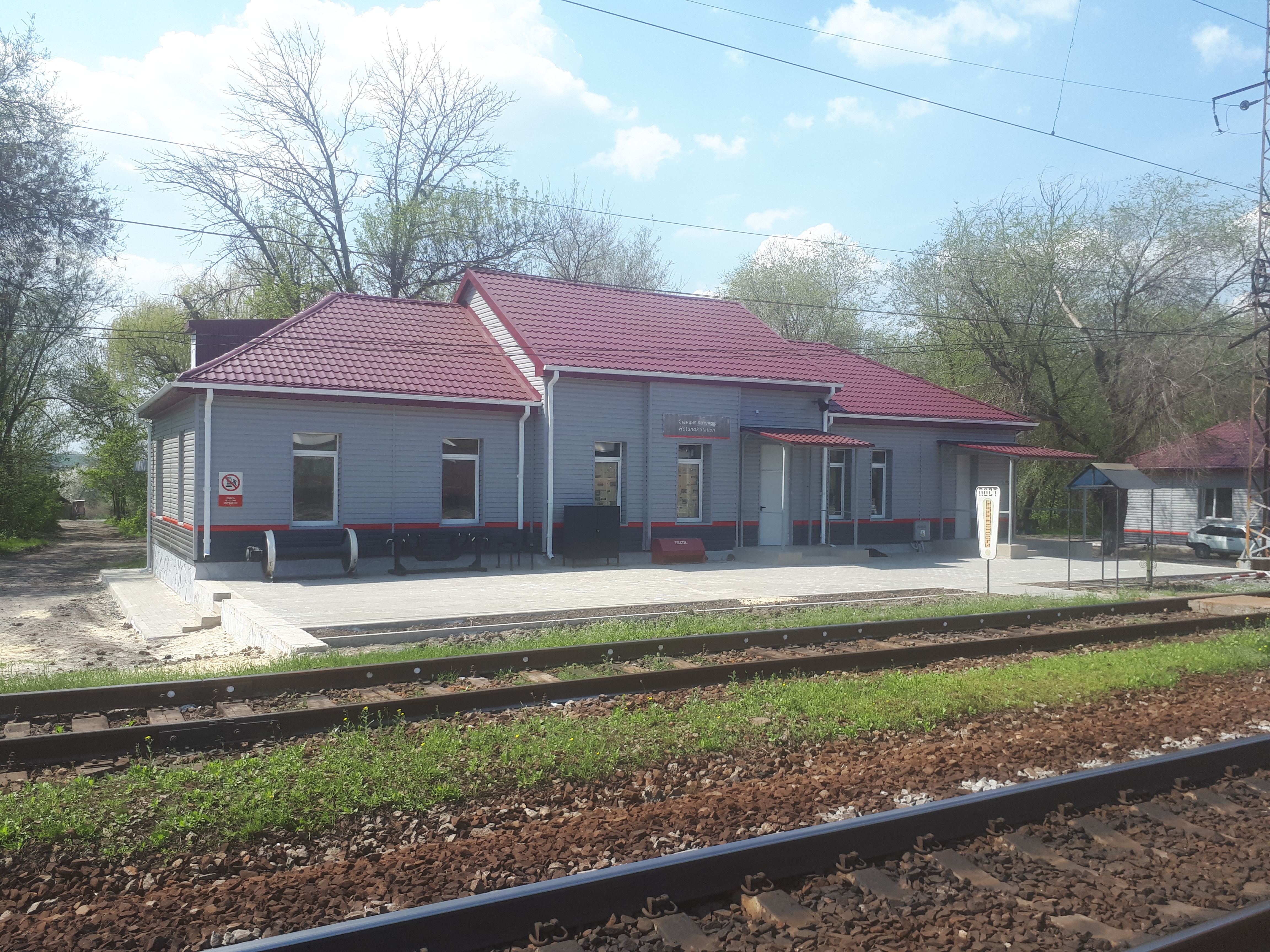 Train station Hotunok (Novocherkassk)